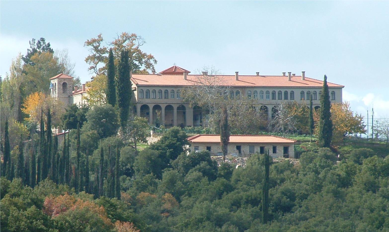 november 2005